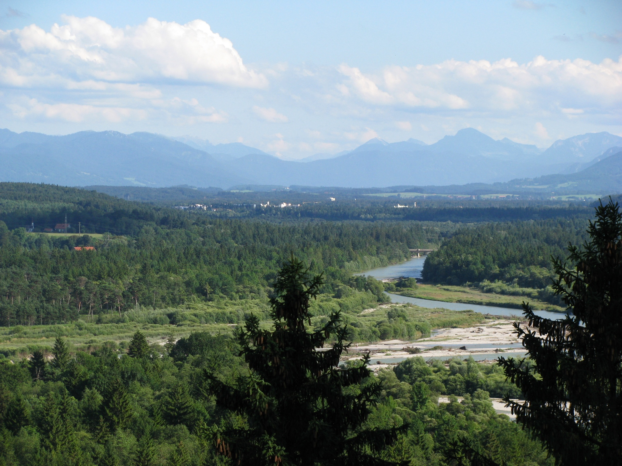 Isartal bei Wolfratshausen. Ausblick vom Aussichtspunkt Weiße Wand bei Icking zur Pupplinger Au und in das Isartal Richtung Geretsried, Bad Tölz.